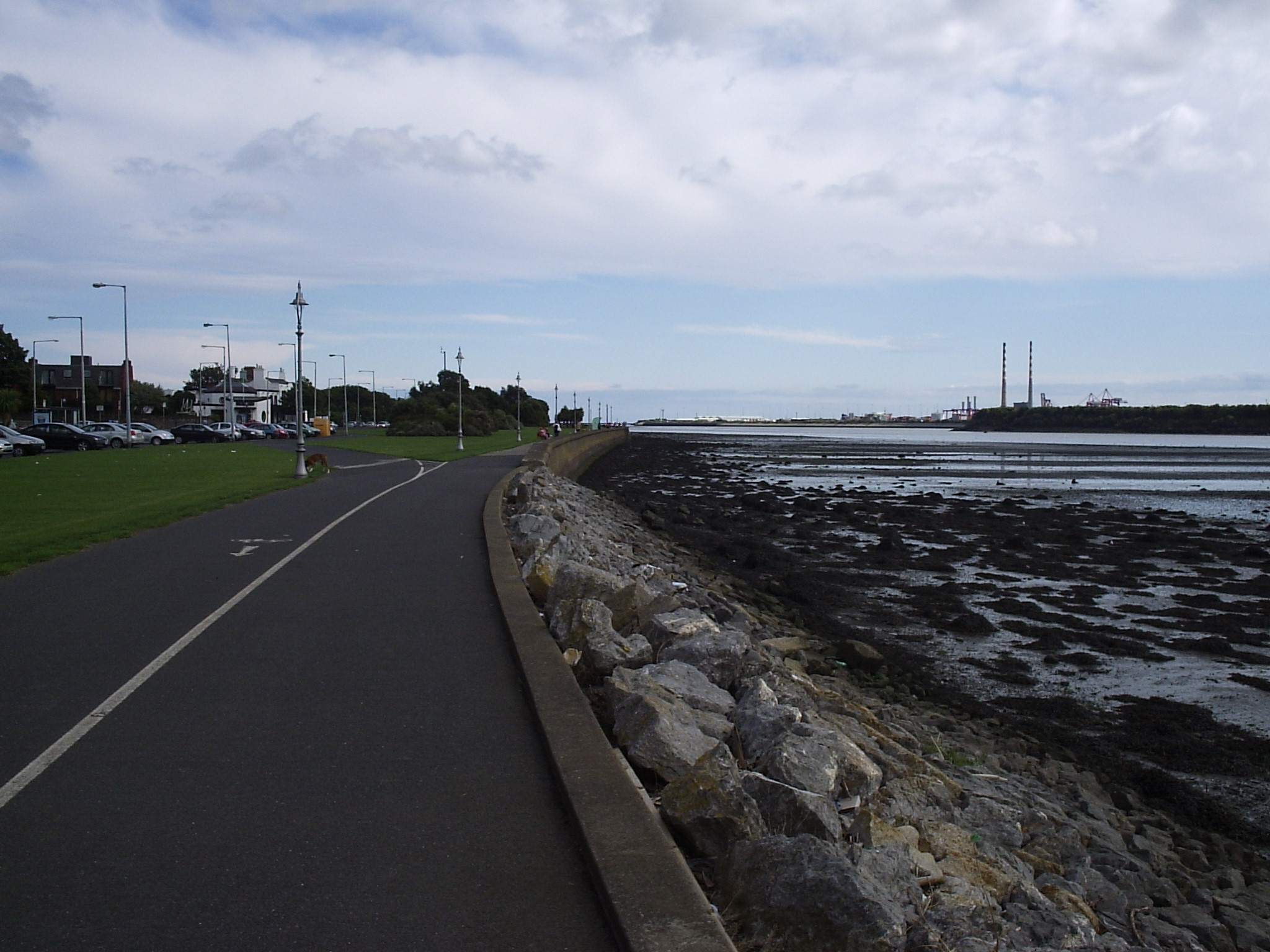 Clontarf